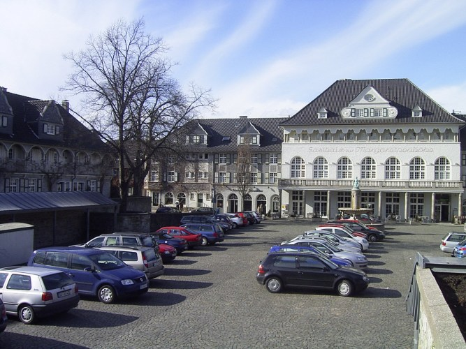 Marktplatz der Gartenstadt Margarethenhöhe in Essen